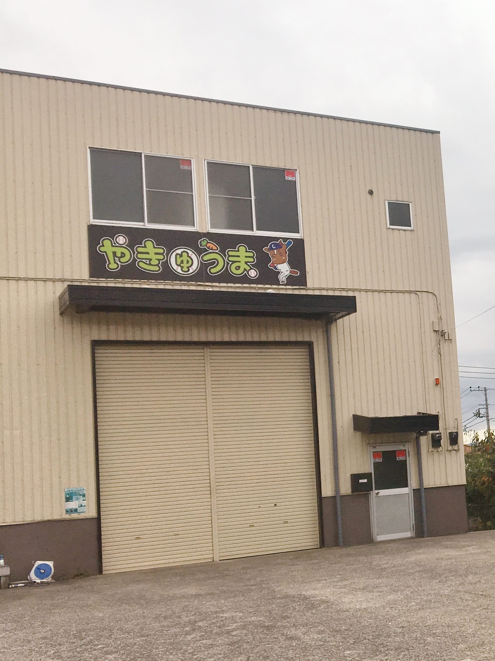 やきゅうま 元西武ライオンズ柴田博之の野球塾